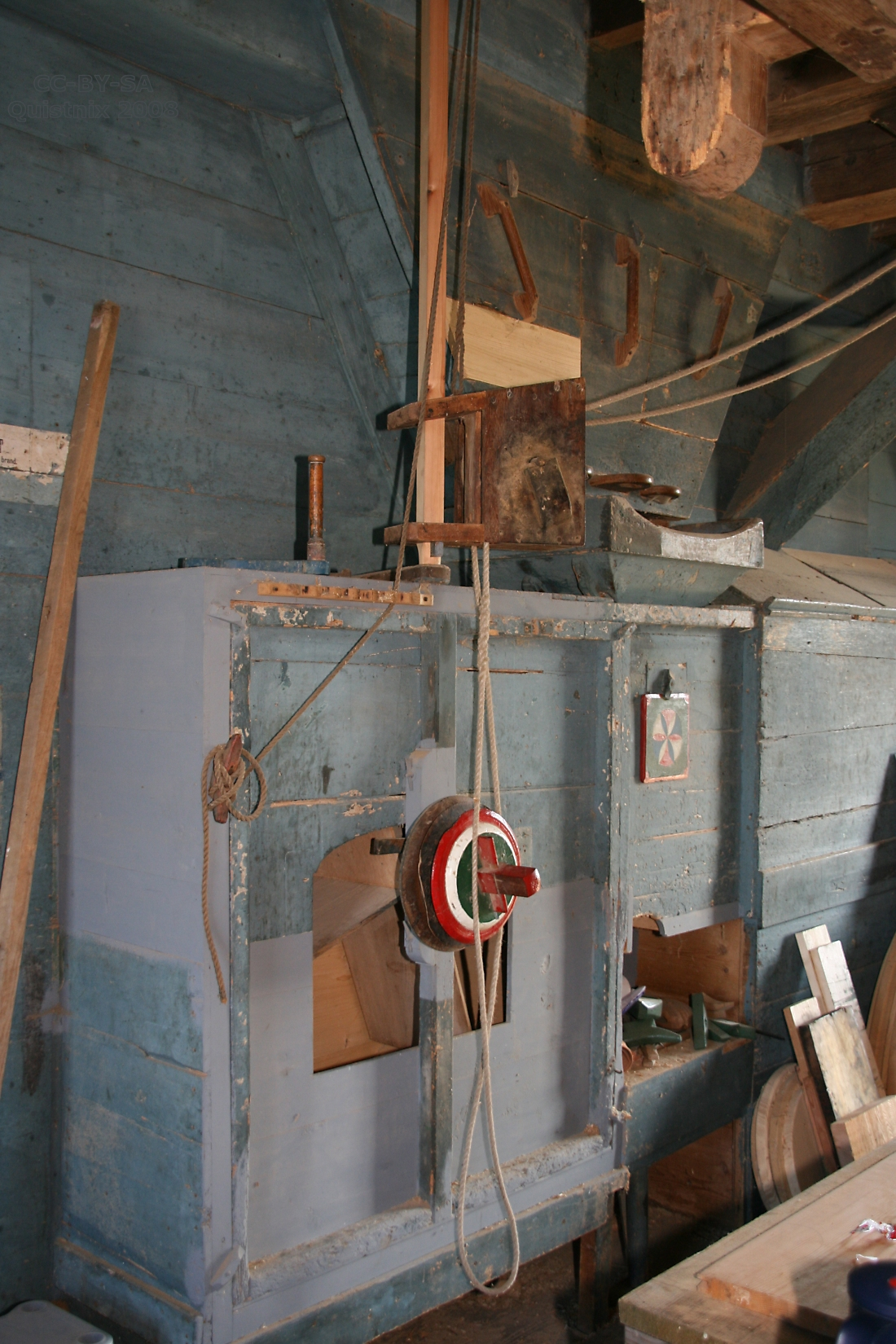 Westzaan: Het Prinsenhof - waaierkast